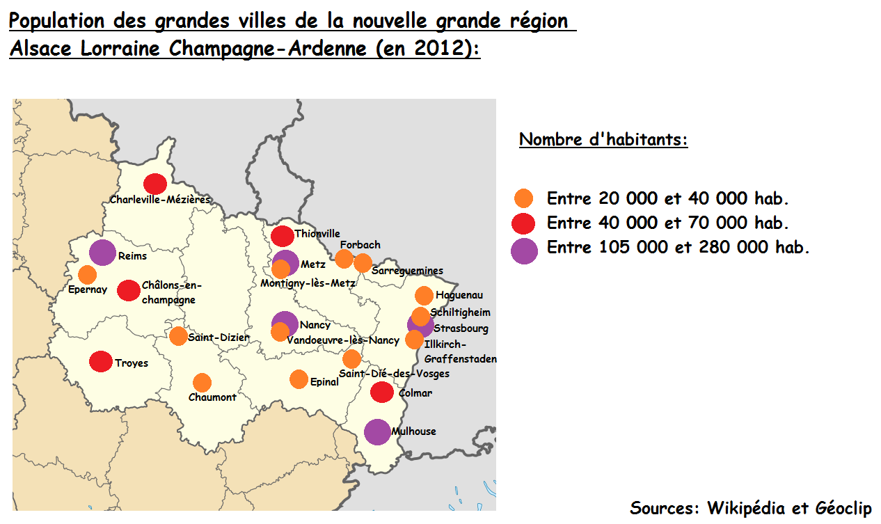 Population des plus grandes villes de la grande région. Carte de ma propre création.